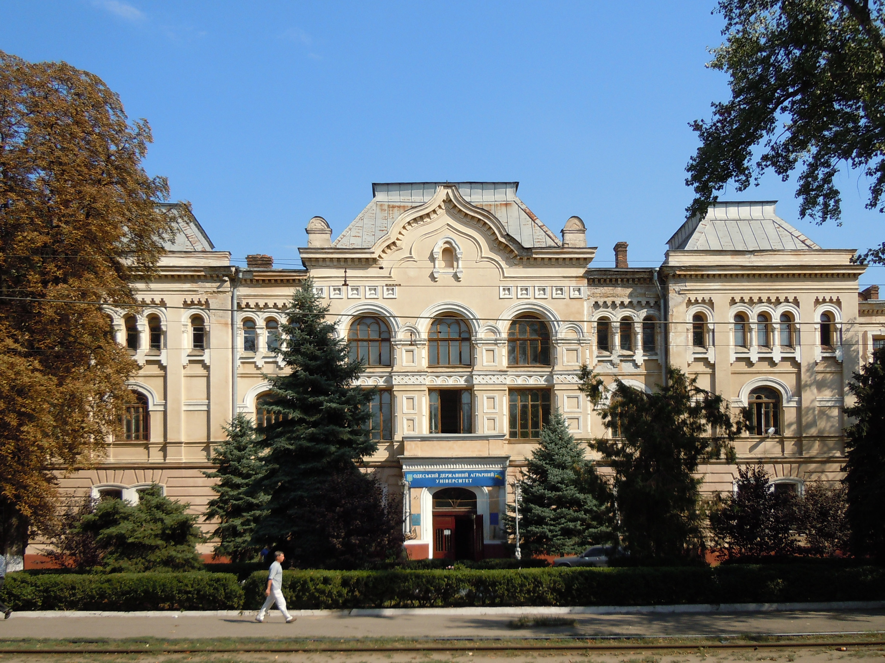 Комплекс будівель Духовної семінарії (Одеської сільськогосподарської академії), де у колишній Духовній семінарії навчались: - у 1860-1865 рр. Васил Друмов - болгарський письменник і громадський діяч; - у 1869-1875 рр. Потапенко І.- російський письменник; в Одеському сільськогосподарському інституті навчались: - у 1918-1925 рр. Сербінов І.Л.- міколог і мікробіолог, один із засновників ОСГІ, професор; - у 1923-1925 рр. Пузанов І.Ф.- рослинознавець, акад. ВАСГНІЛ, лауреат Ленінської премії; - у 1925-1930 рр. Ф.Є.Реймерс - фізіолог рослин член-кореспондент АН СРСР., Одеса, Канатна вул., 99